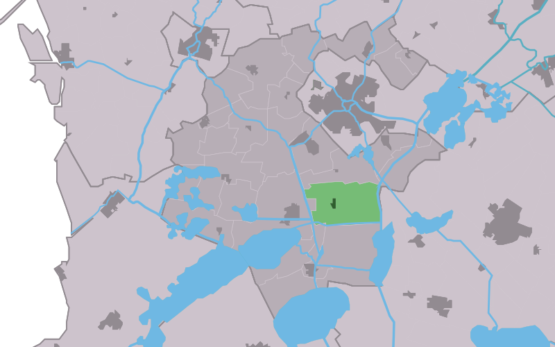 Kaartsje fan himrik fan De_Hommerts